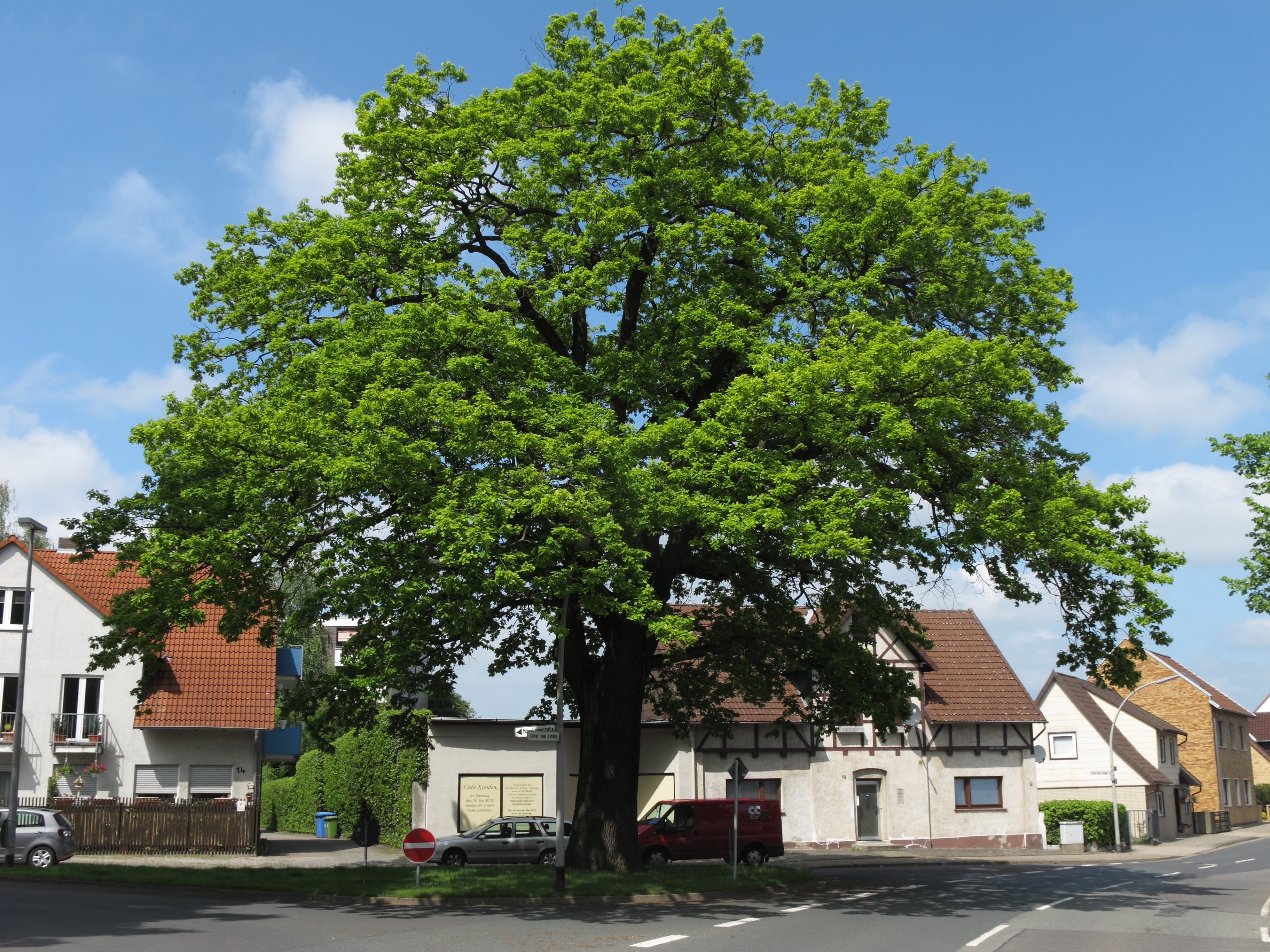 Braunschweig Veltenhof, Naturdenkmal ND-BS9, alte Eiche